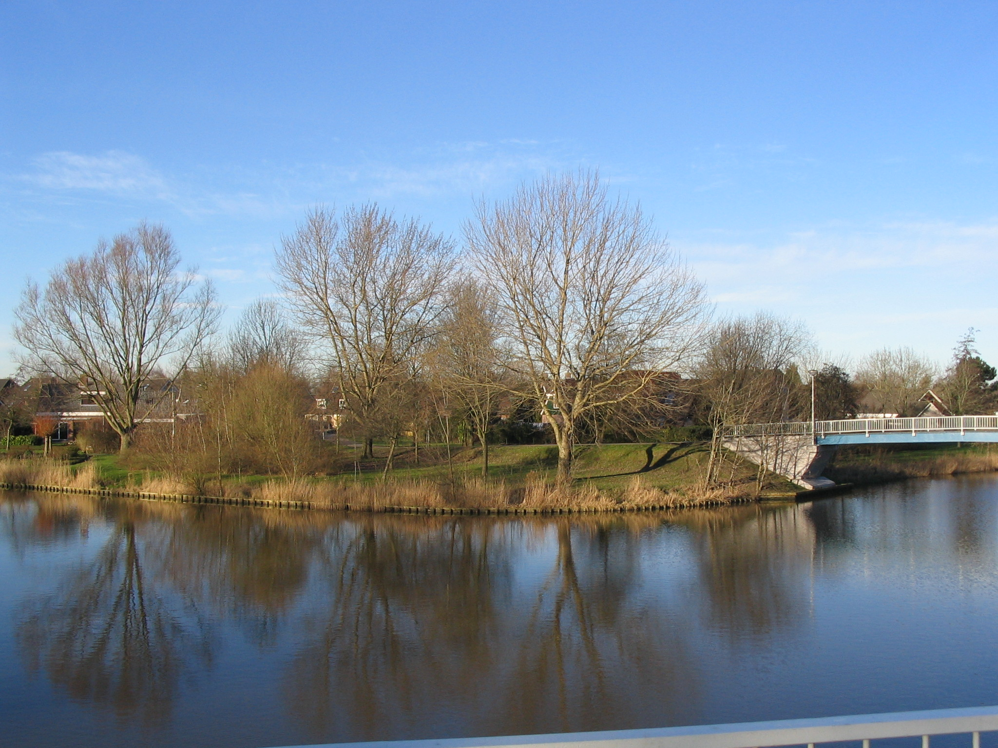 Dethermerseiland in het Damsterdiep bij Delfzijl